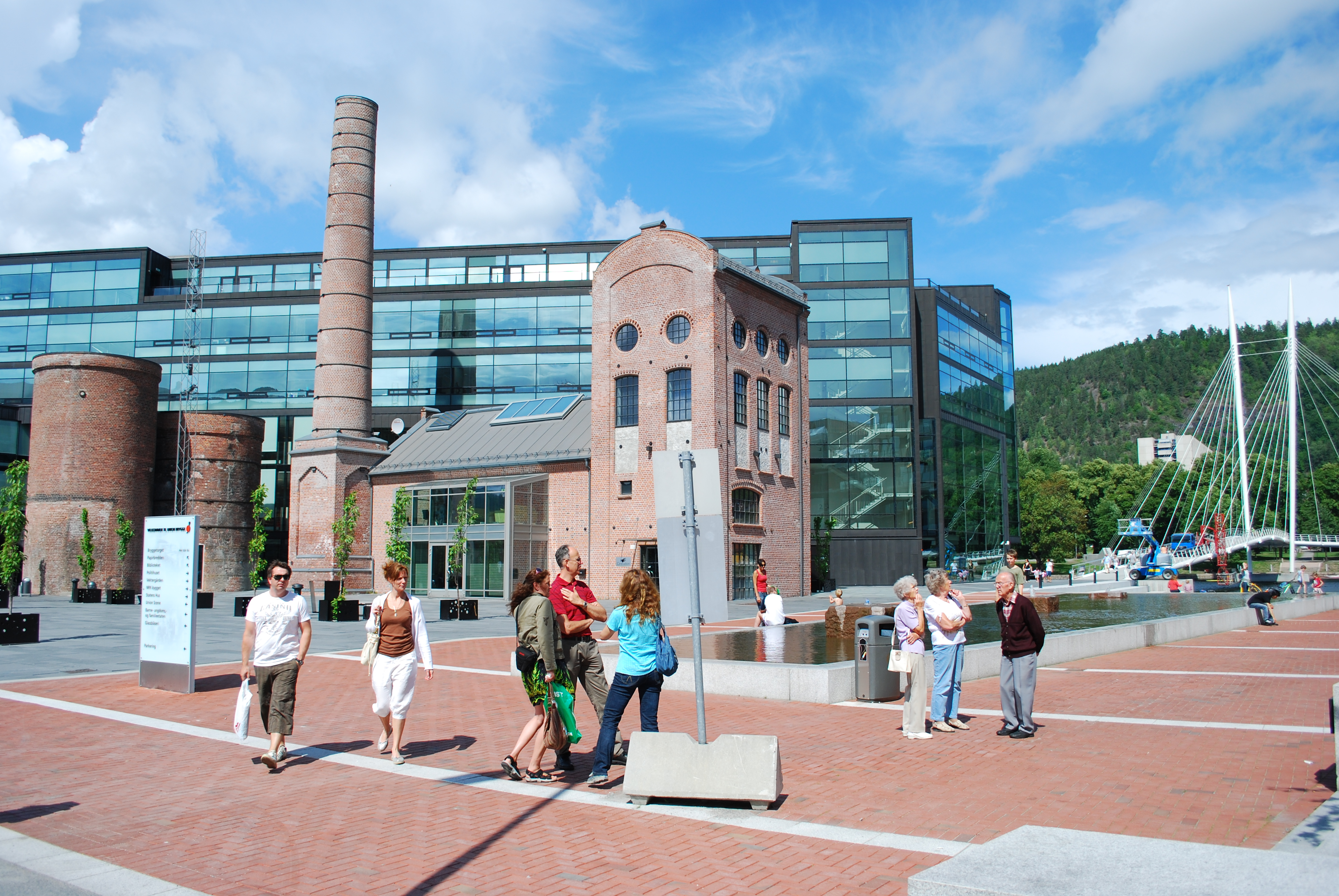 Union brygge, Drammen, Norge